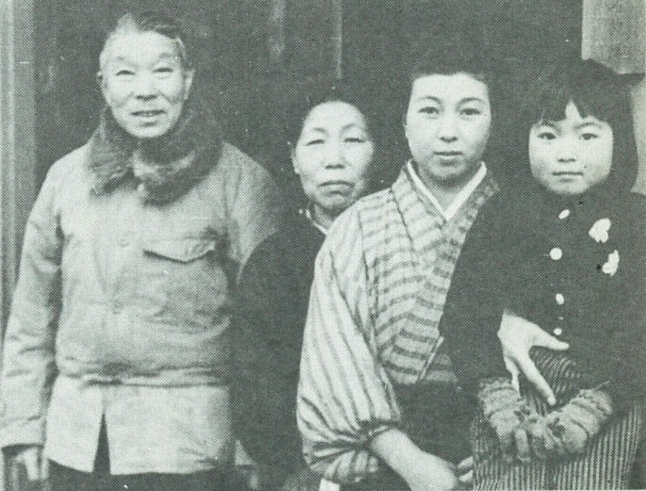 昭和22年撮影。右より宮崎皙子（郁雨長男の娘）、郁子（郁雨長男の妻）、ふき子（郁雨の妻）、宮崎郁雨